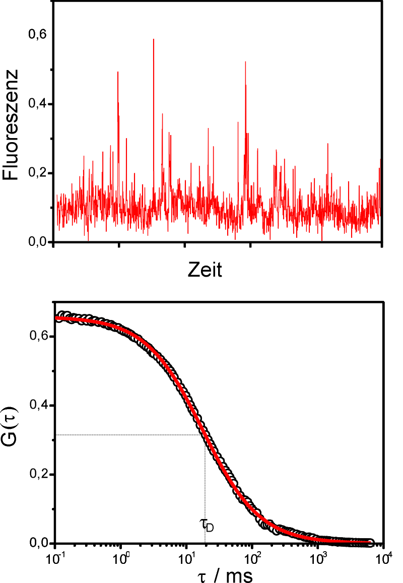 Fluoreszenzsignal und Korrelationsfunktion bei der FCS